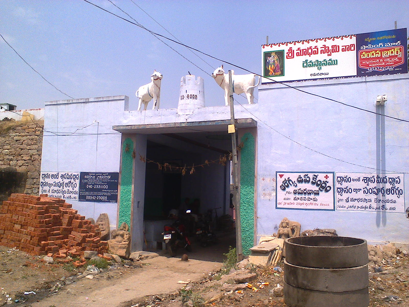 ఊరువాకిలి